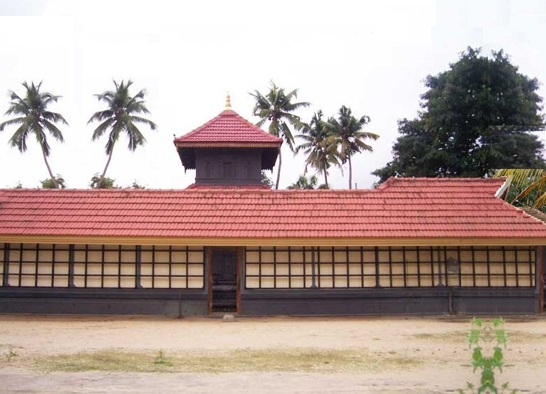 ചേരാനല്ലൂർ (മാരാപറമ്പ് മഹാദേവക്ഷേത്രം)